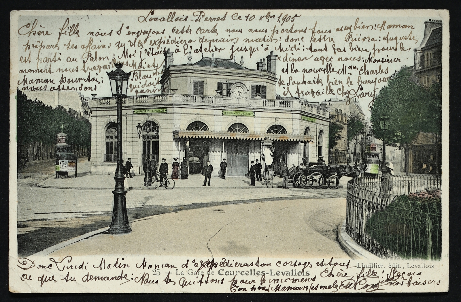 Levallois-Perret.Gare de Courcelles-Levallois